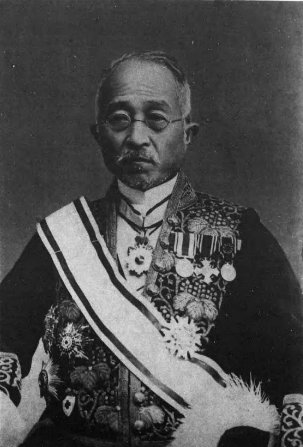 白仁武（1863-1941）